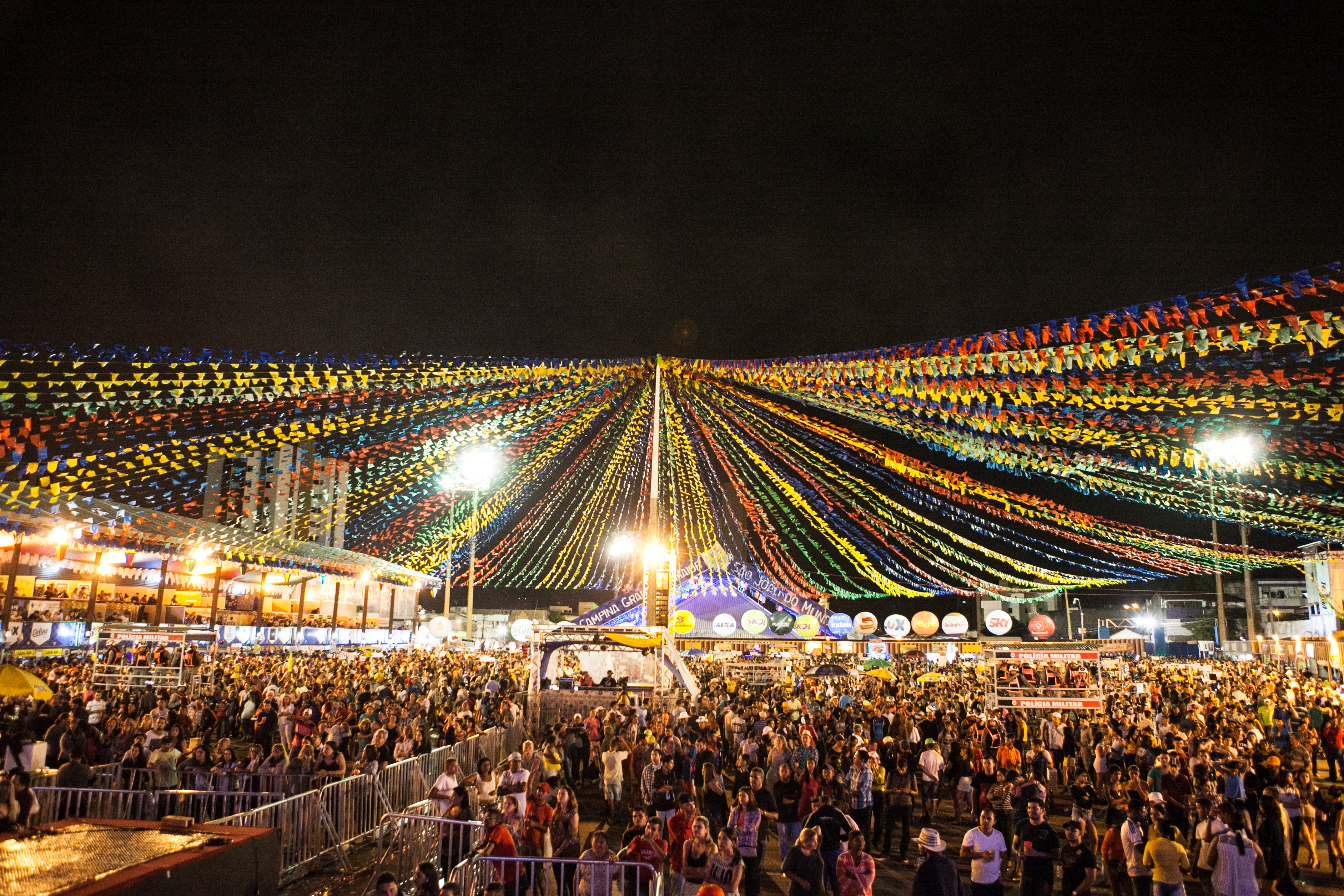 19-06-2016 Marcelo Calero conhece o São João de Campina Grande. Fotos: Janine Moraes/MinC